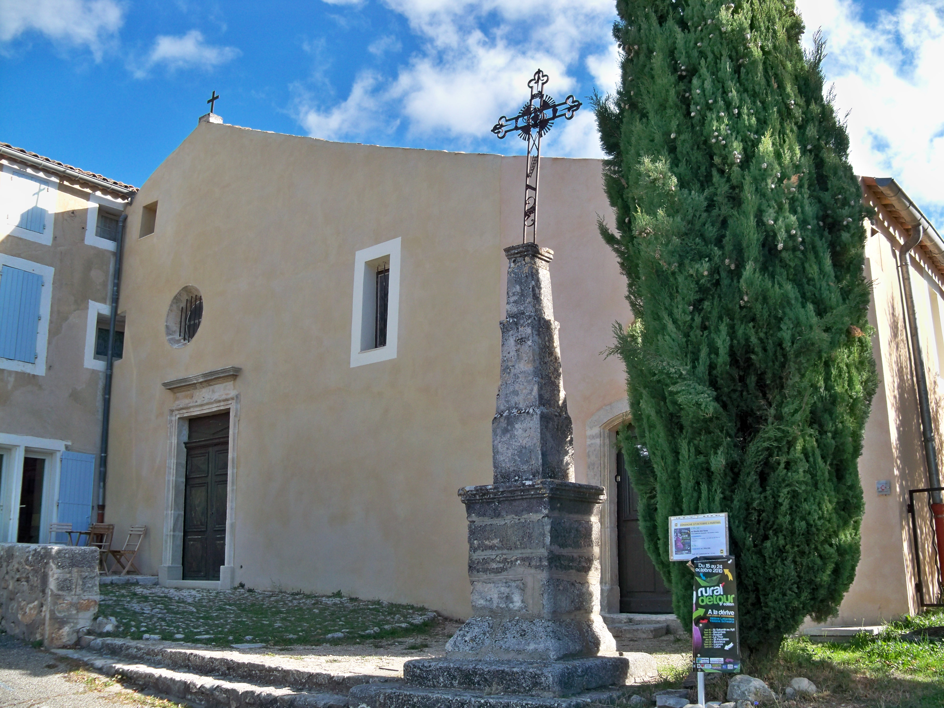 église de Rustrel, Vaucluse, France